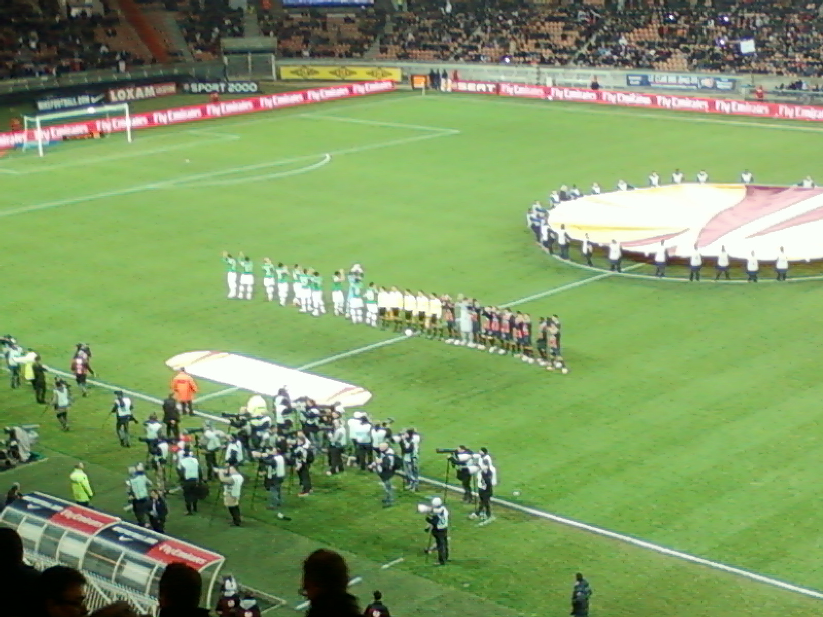 Présentation des équipes lors du match Paris SG - Athletic Bilbao du 14 décembre 2011 au Pars des Princes